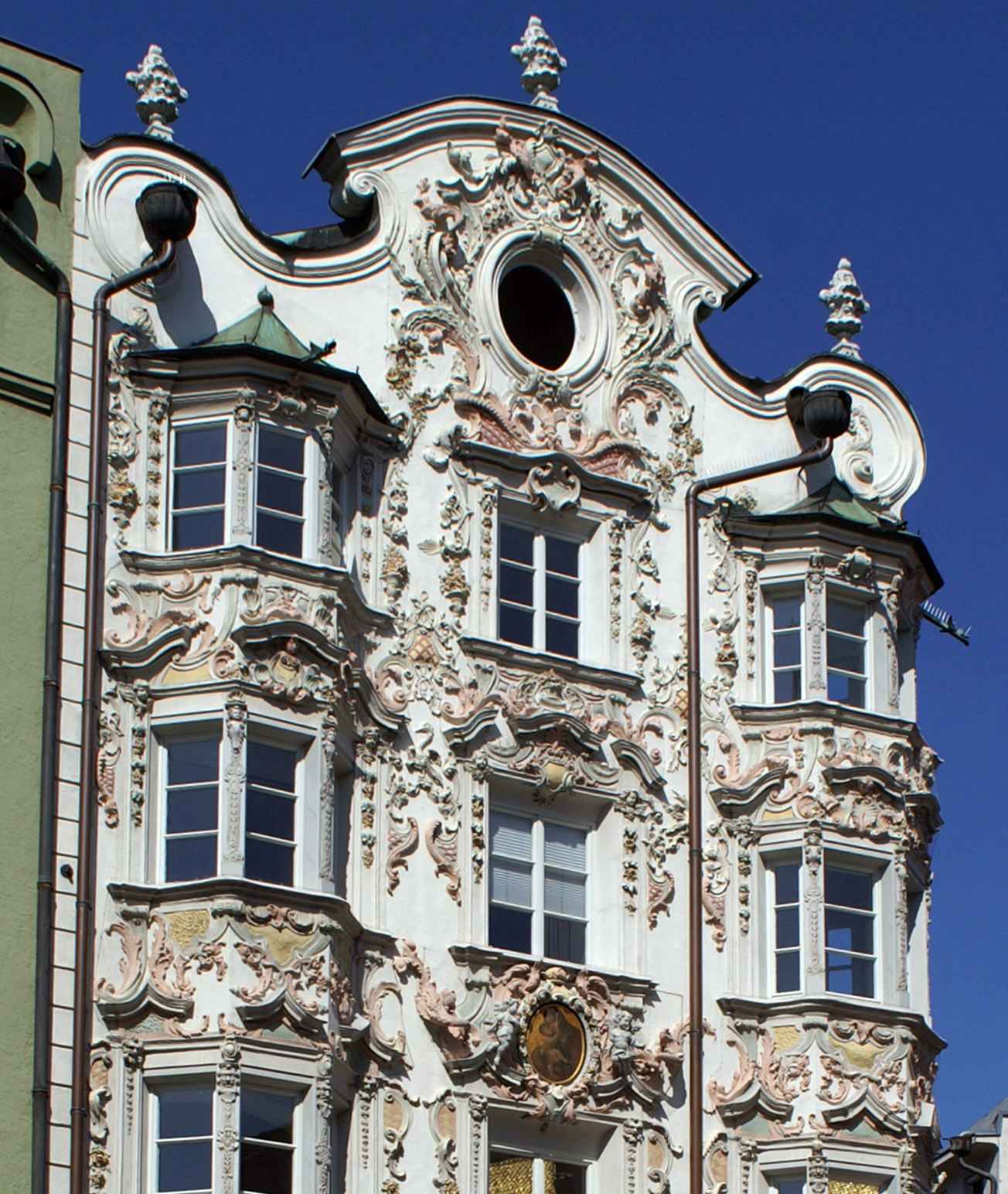 Helblinghaus, Innsbruck, mit berühmter barocker Stuckfassade. Ausschnitt